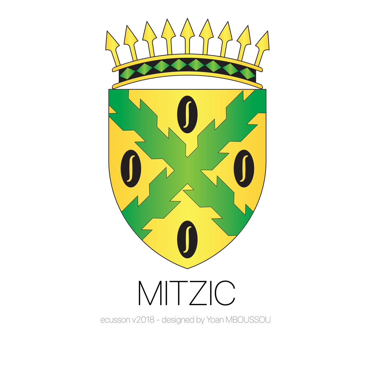 Ecusson de la ville de Mitzic